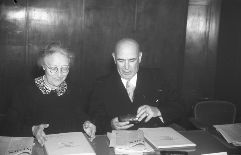 Ministerpräsidenten-Konferenz der Länder der 3 Westzonen Deutschlands auf dem Berghotel Rittersturz in Koblenz (v.l.n.r.: Louise Schroeder, Jakob Steffan) 8.-10.7.1948